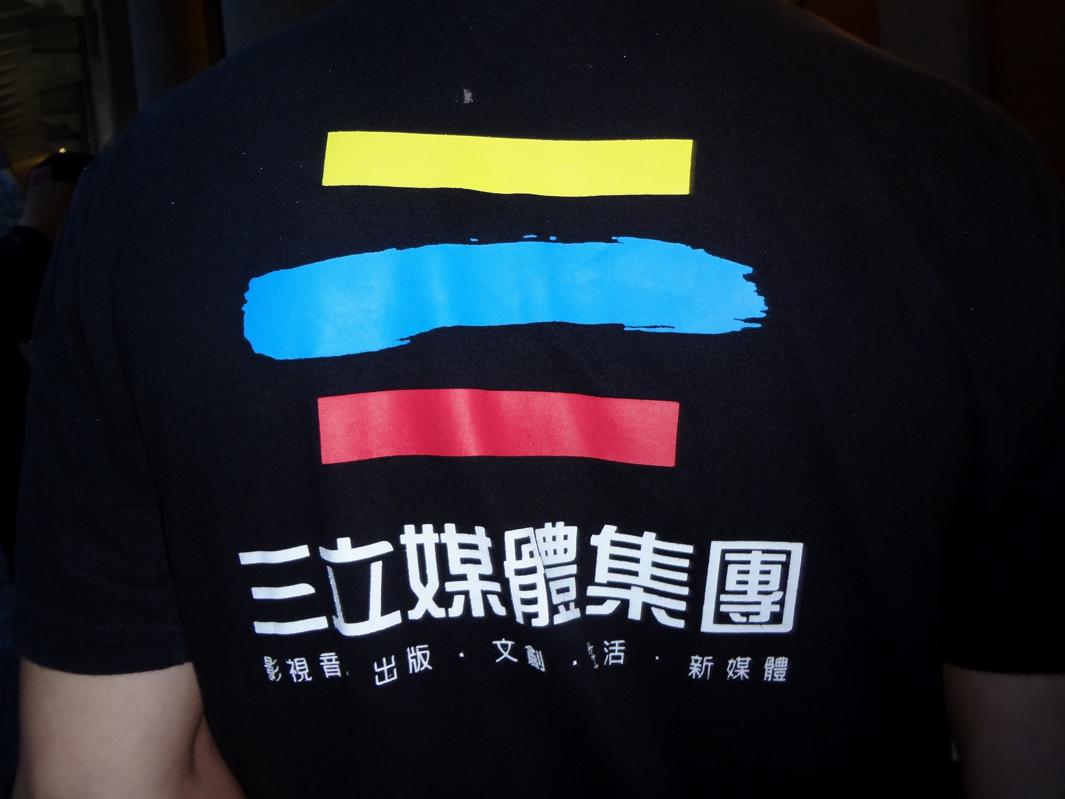 第51屆金鐘獎電視金鐘獎頒獎典禮星光大道，三立電視男性工作人員T恤背部的三立媒體集團標誌，即1990年代三立衛星電視台標誌。